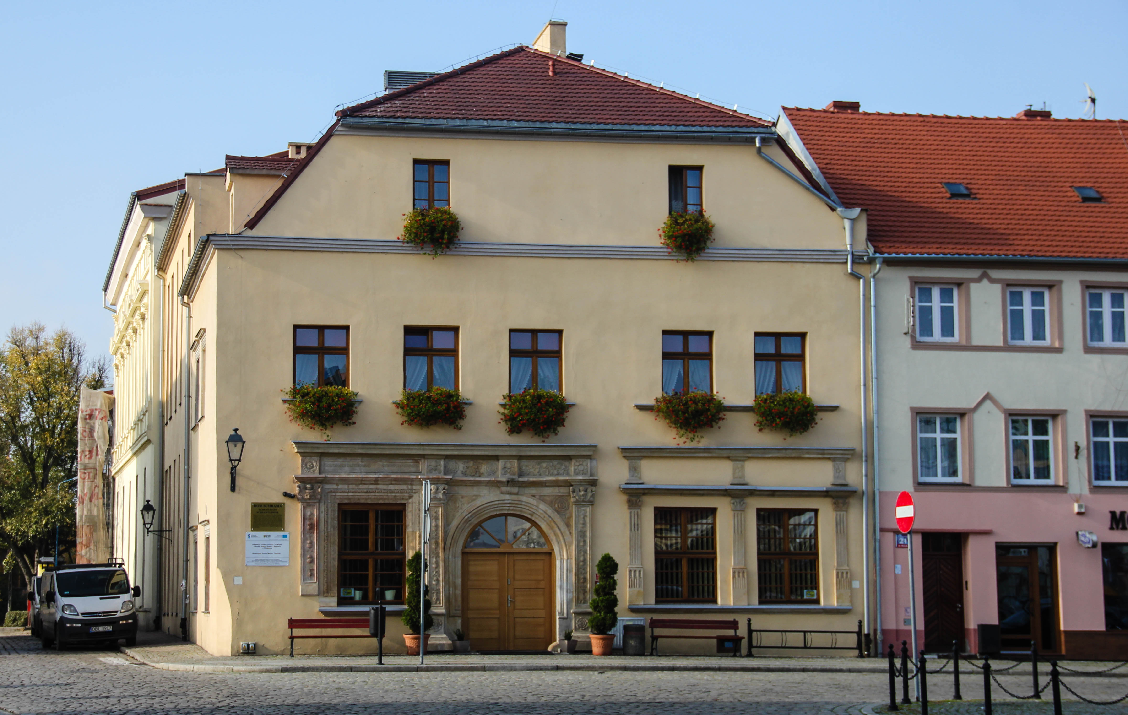 Wschodnia fasada Domu Schrama w Chojnowie.